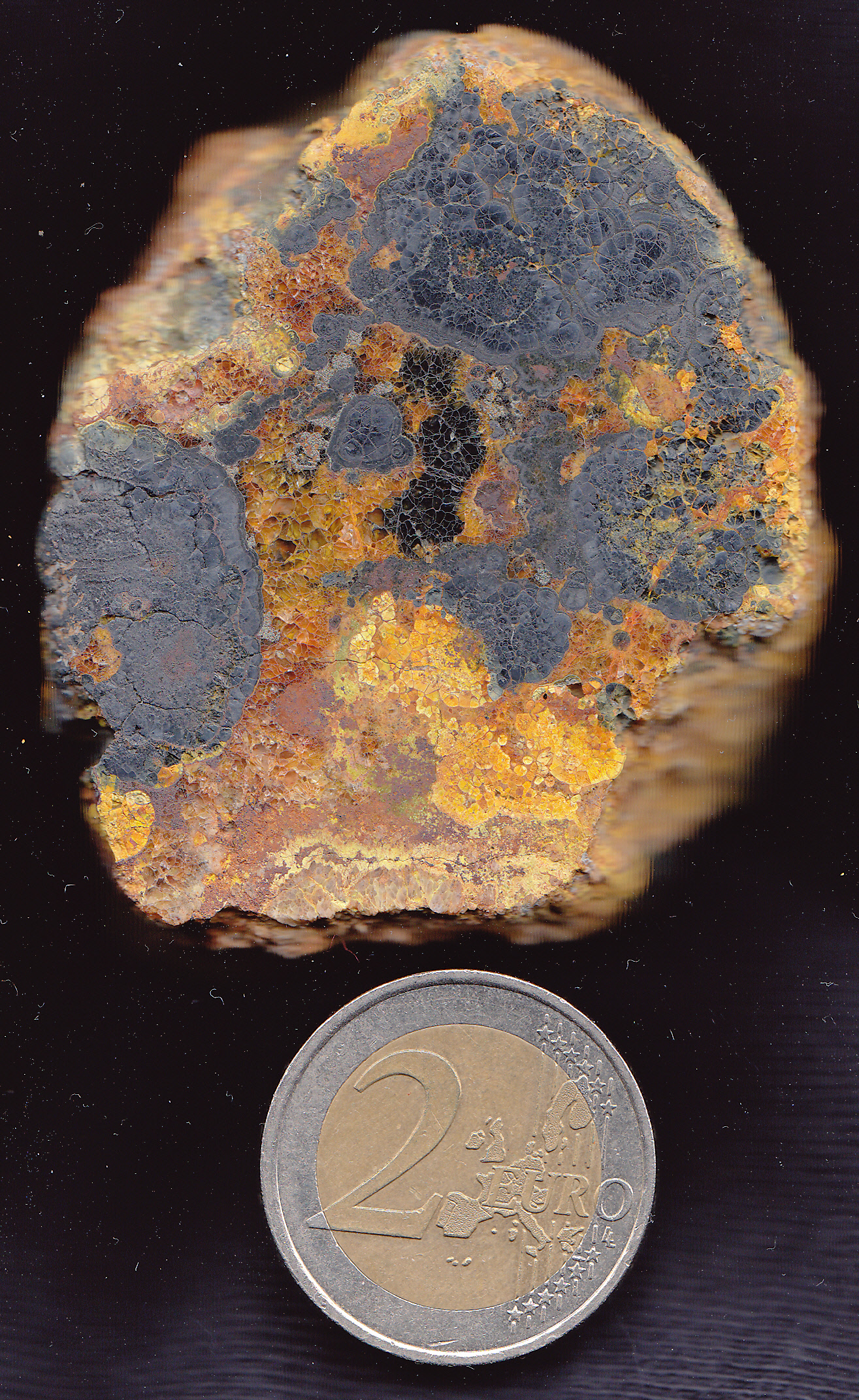 La pièce de 2 euros donne l'échelle. On peut observer les sphérolithes caractéristiques de la pechblende.